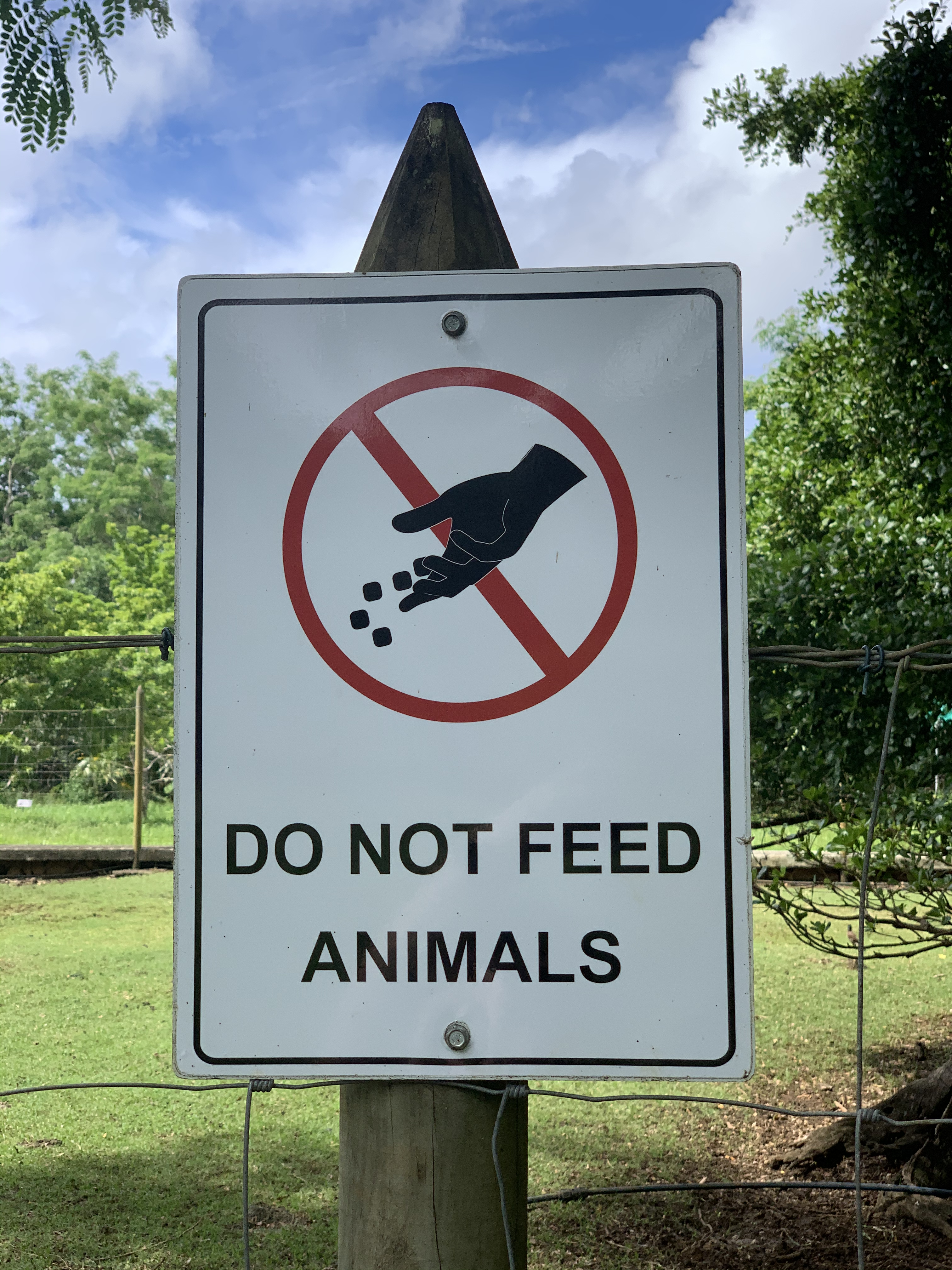 Panneau - ne pas nourrir les animaux (Pamplemousses).